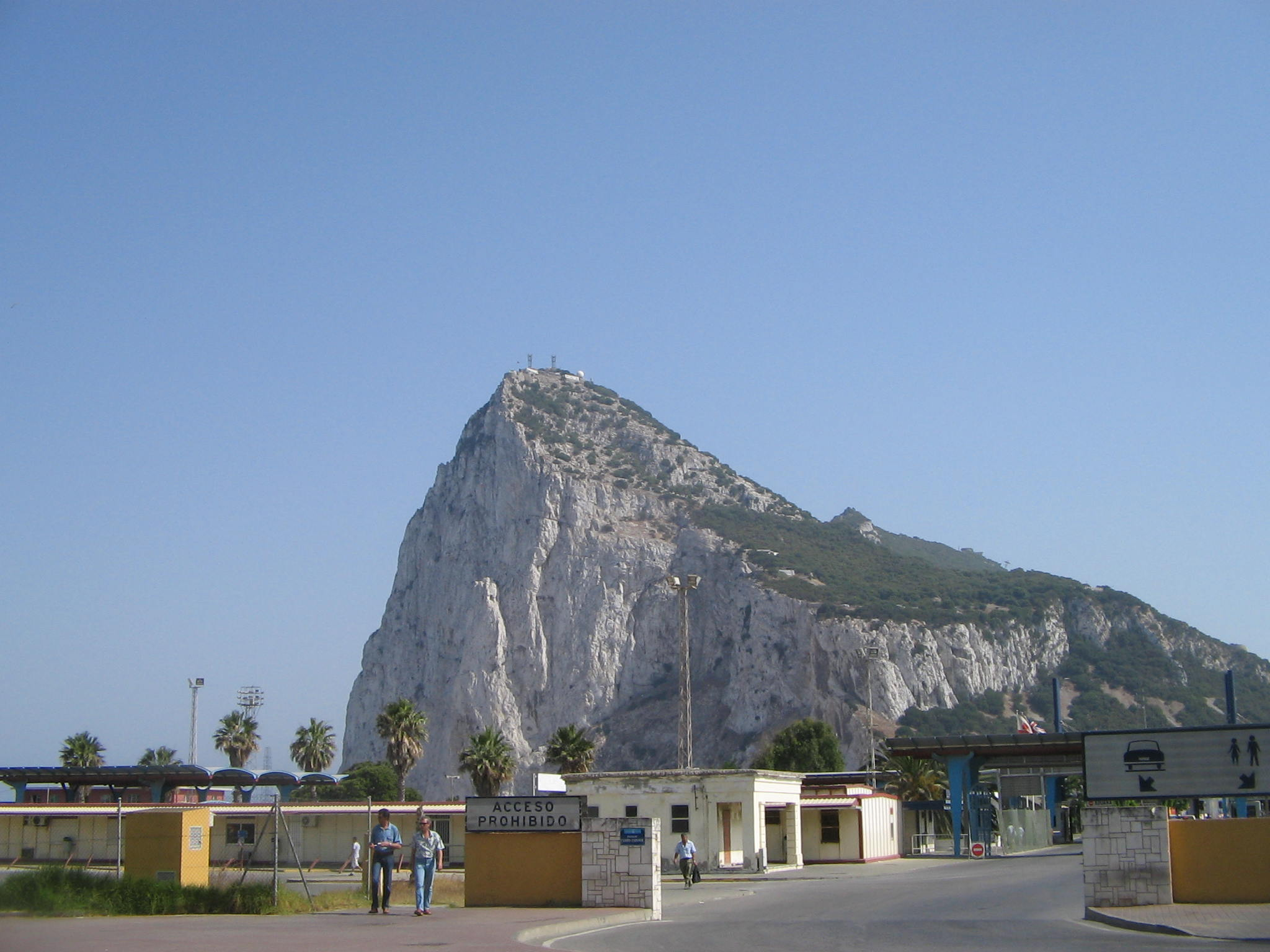 Vista de la aduana española de acceso a Gibraltar desde la avenida Príncipe de Asturias de La Línea de la Concepción.